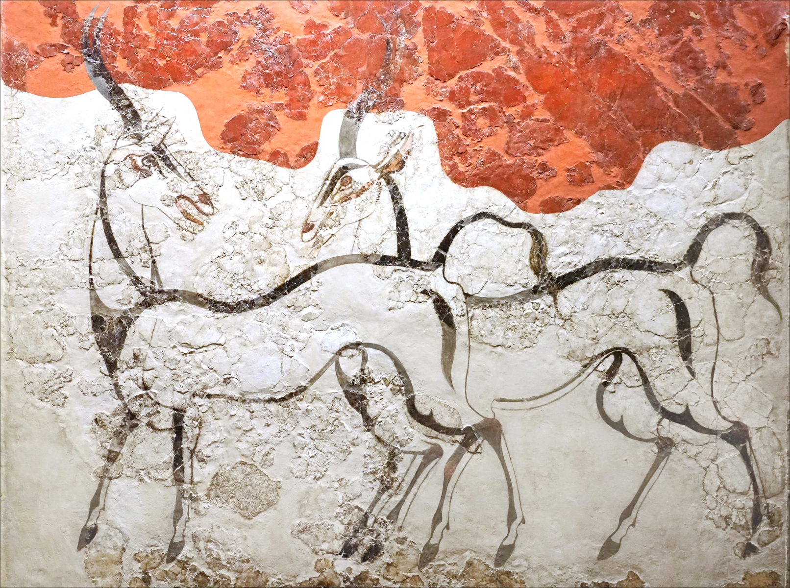 Antilopes âge du bronze moyen (2000-1600 av. J.-C.) Ces peintures murales ont été découvertes lors des fouilles archéologiques de la ville antique d'Akrotiri dont les maisons ont été enfouies sous les cendres projetées par l'éruption du volcan de Thera, l'ancien nom de Santorin, vers environ 1530 av. J.-C. Le style des ces peintures remarquables, relève de l'art tardif des Cyclades. On constate une forte influence de la civilisation minoenne (Crète). Leur qualité indique le haut niveau de civilisation atteint par les habitants d'Akrotiri. Site du musée national d'archéologie (Athènes)